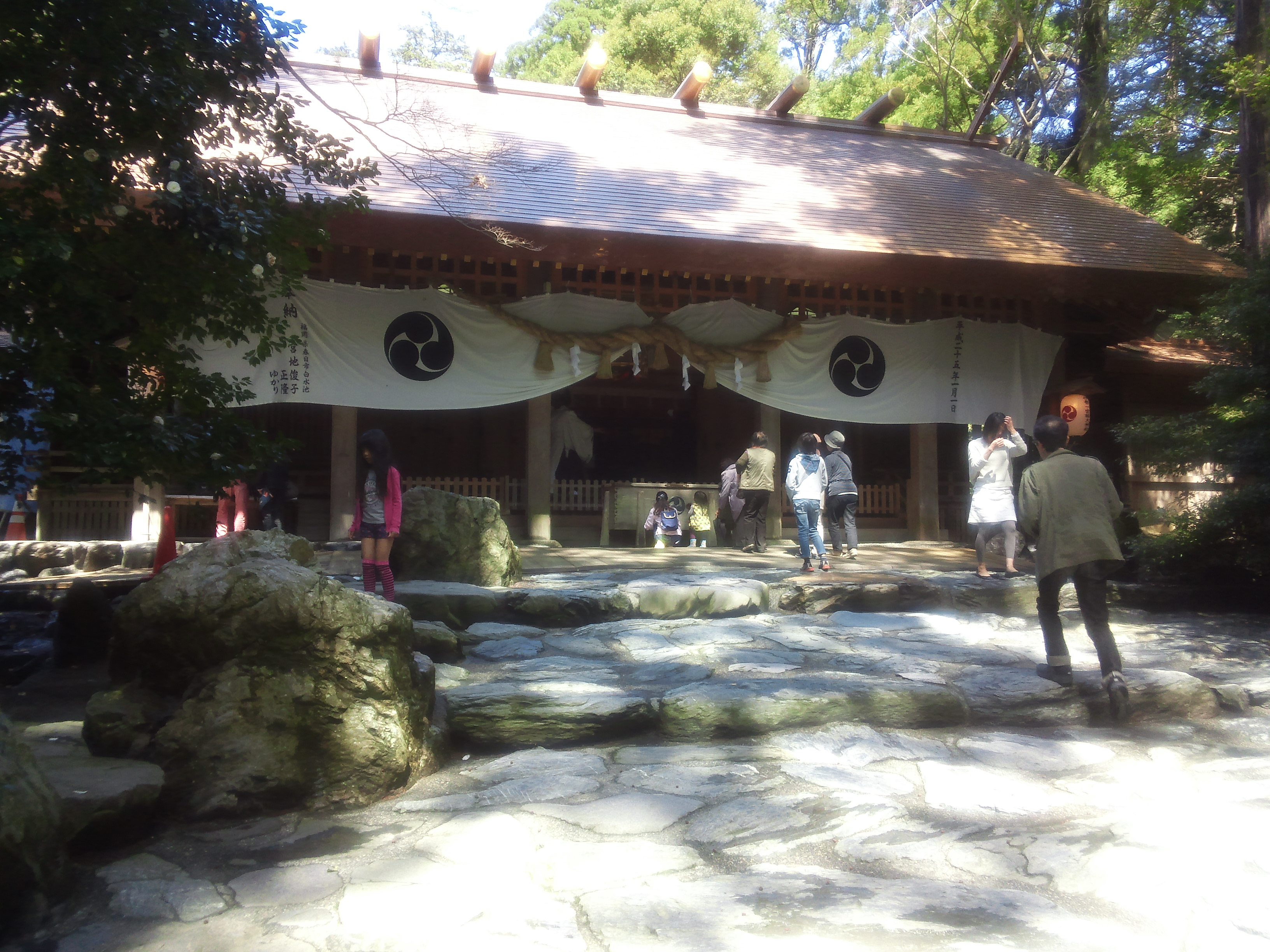 椿大神社 - 拝殿